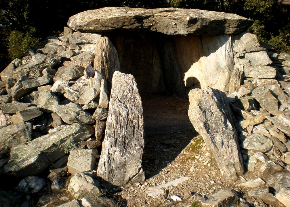 Dolmen de la Jargantière (Villeneuve-Minervois, Aude)